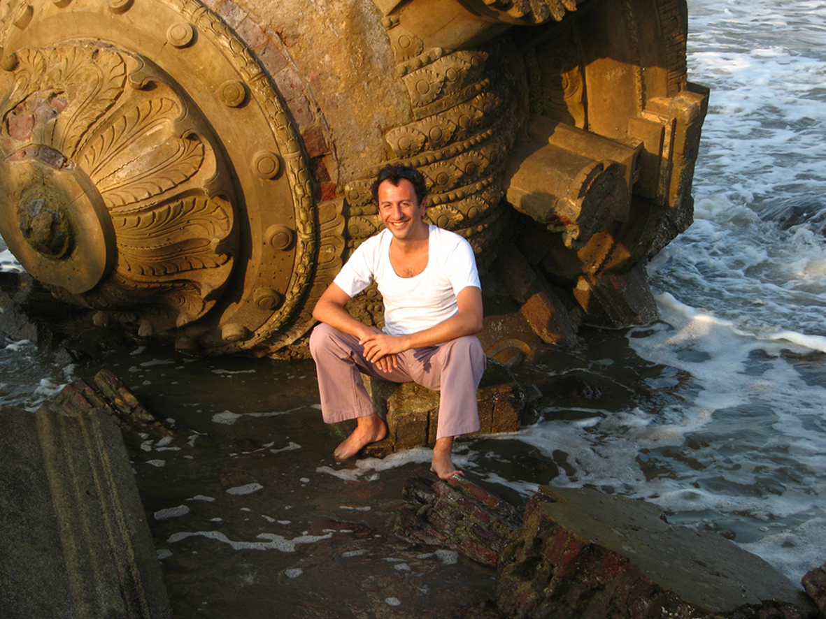 Pascal of Bollywood - Tranquebar - Tamil Nadu - Inde